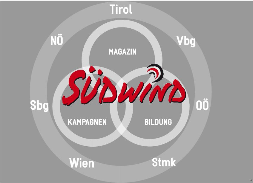 Organigramm zur Beschreibung der Tätigkeit von Südwind